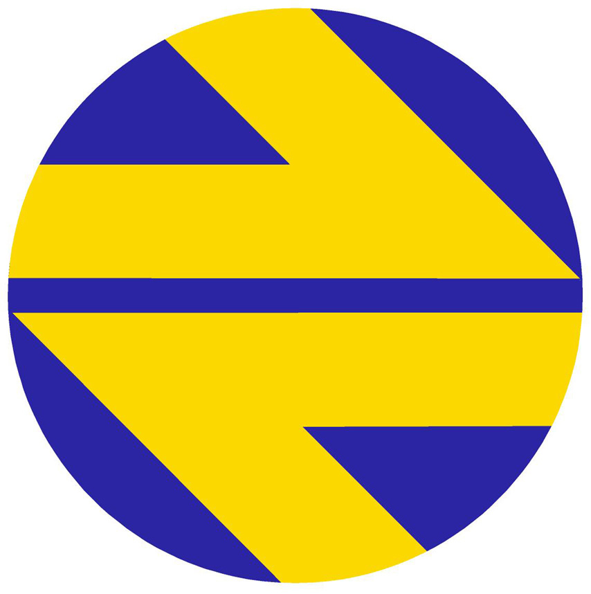 Logo de Renfe (1971).